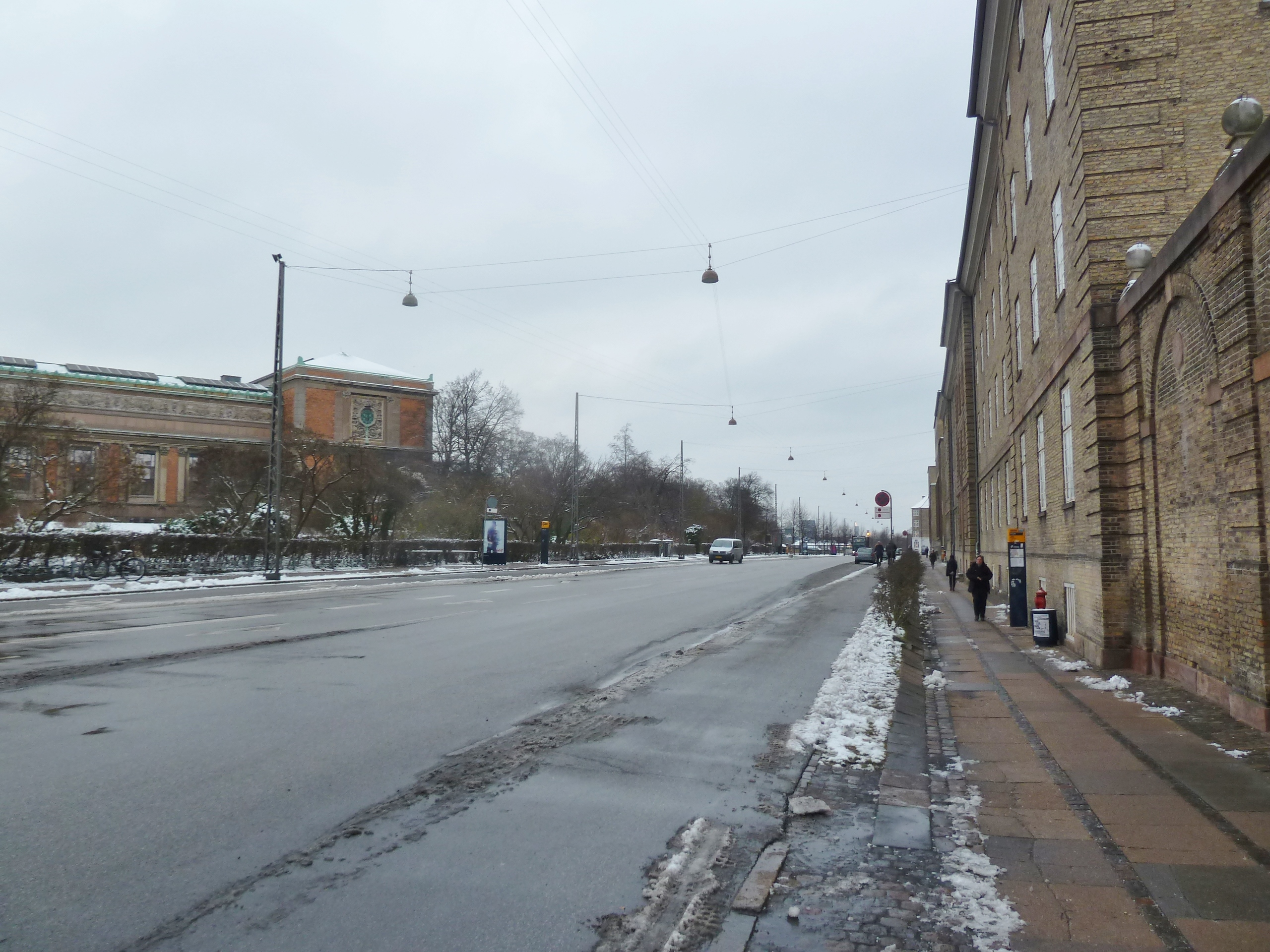 The street Øster Voldgade in Indre By, Copenhagen.